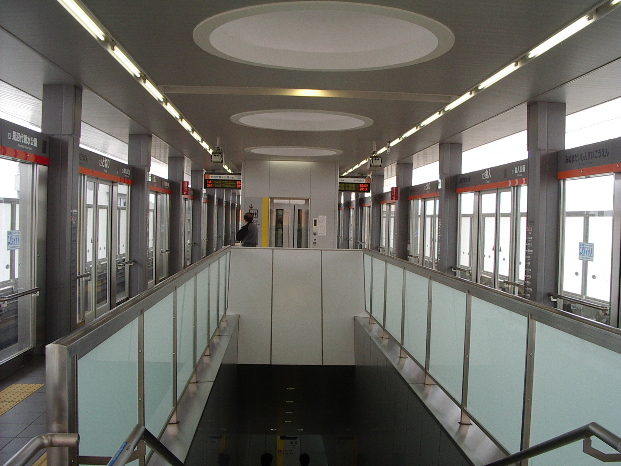 日暮里・舎人ライナー舎人駅